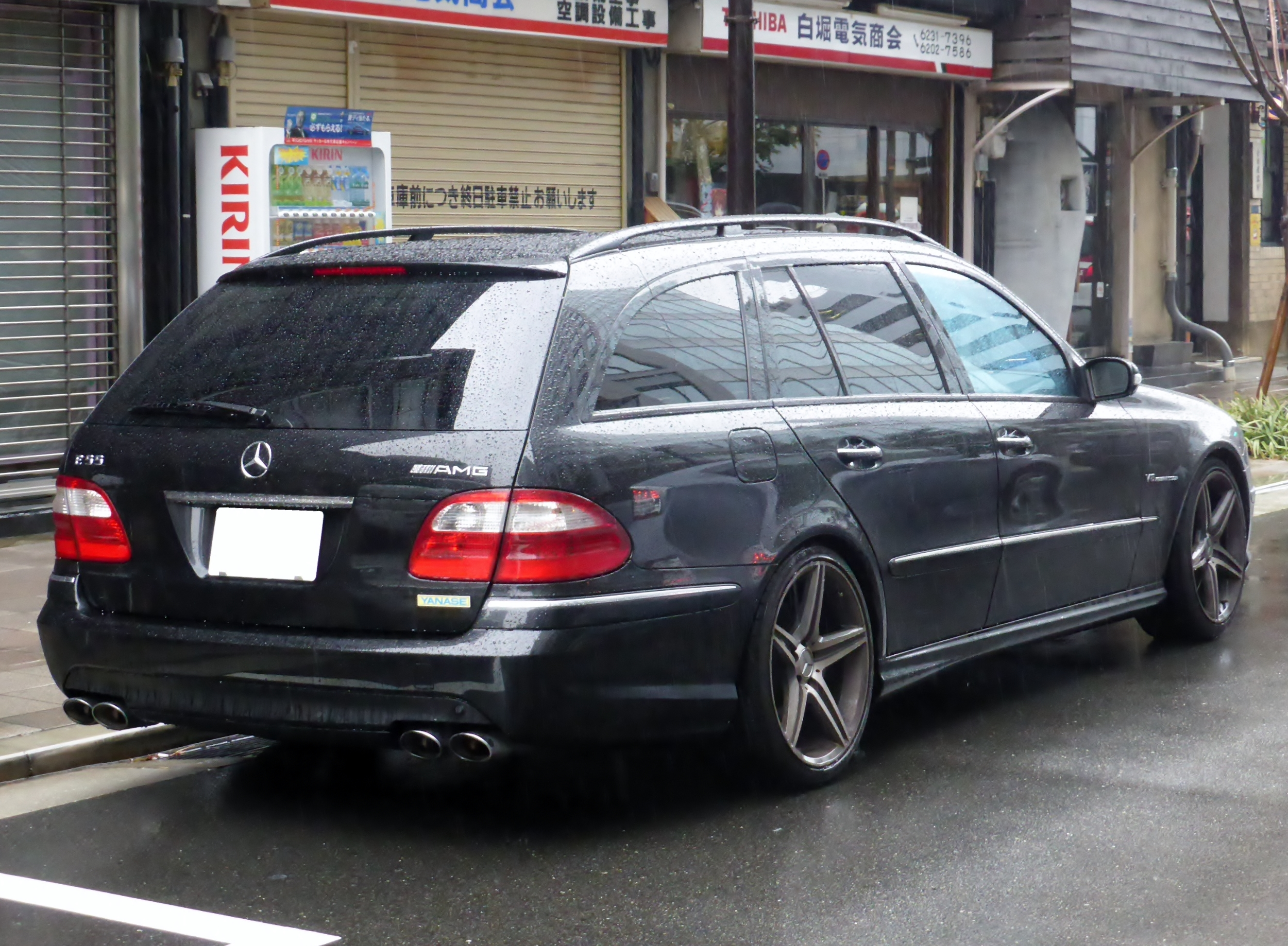 S211型メルセデス・ベンツE55 AMGステーションワゴンをリアから撮影。